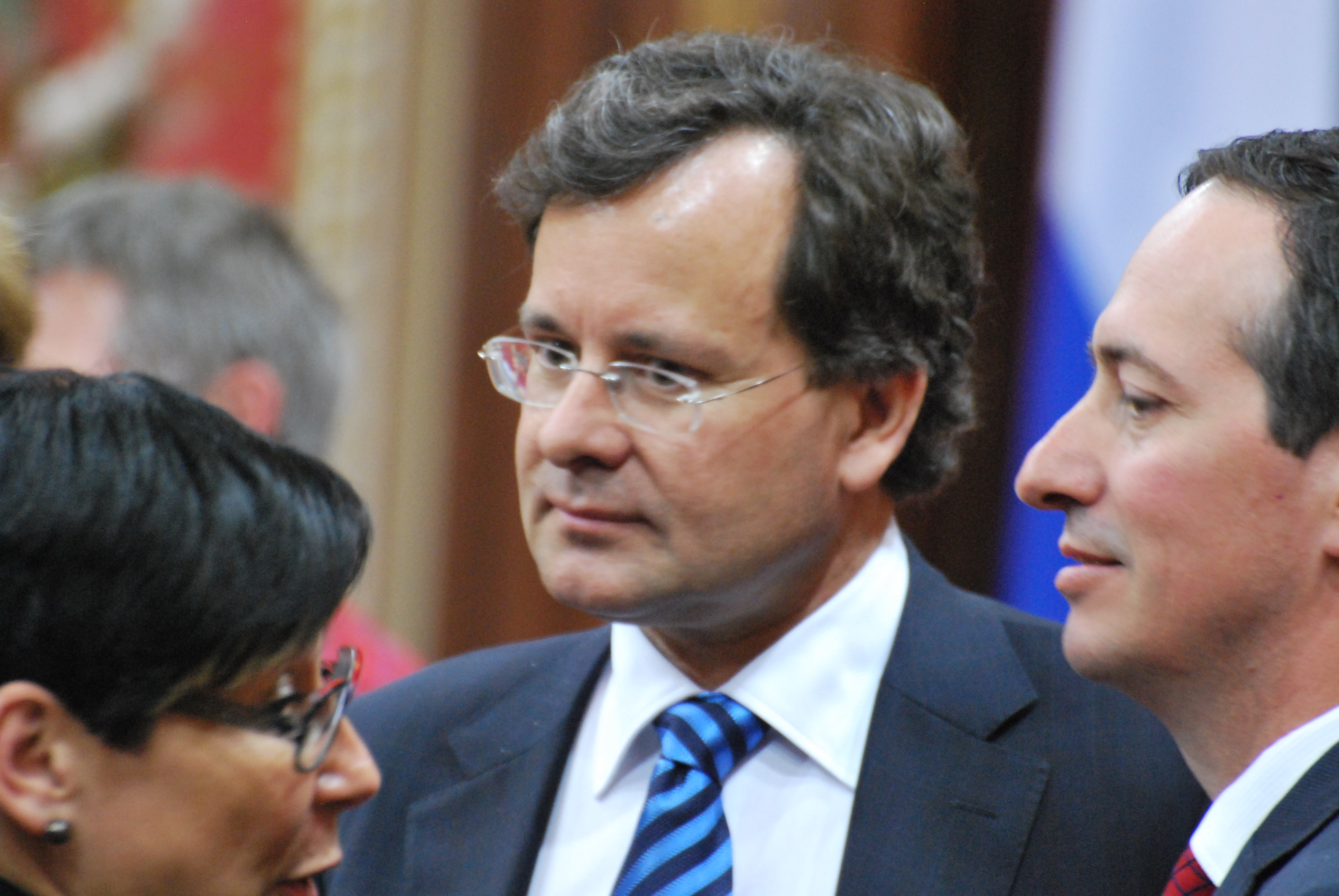 Cérémonie de remise de l'ordre national du Québec 2013. Bertrand St-Arnaud